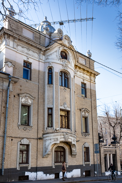 «Дом беседующих змей» работы скульптора Ивана Барютина, главный особняк усадьбы Латышевых — Бахрушиных — Бардыгиных в Москве по адресу Воронцово поле, 6-8. С 1952 года принадлежит посольству Индии.